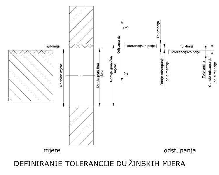 Mjerna tolerancija